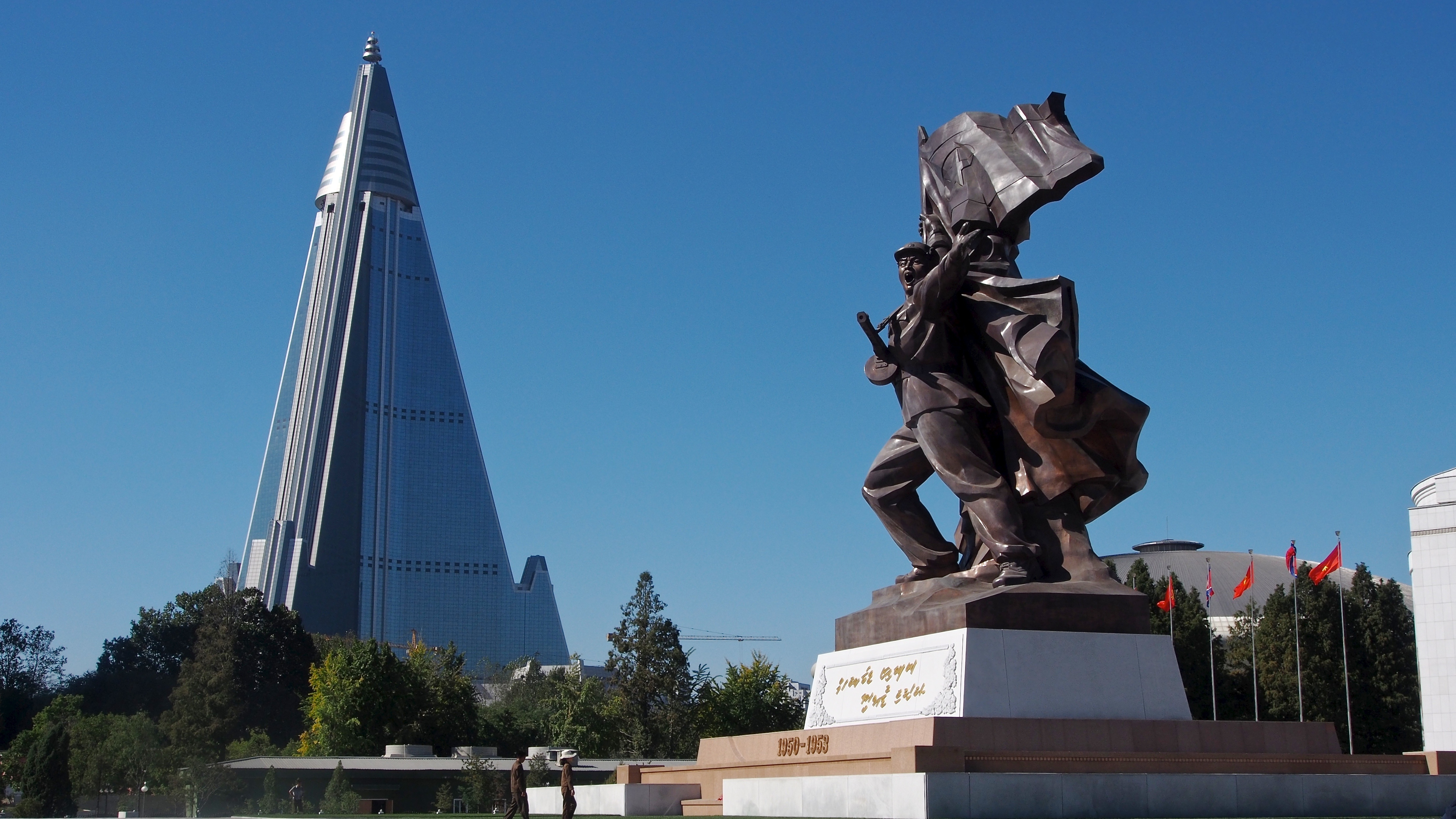 Pyongyang DPRK , North Korea